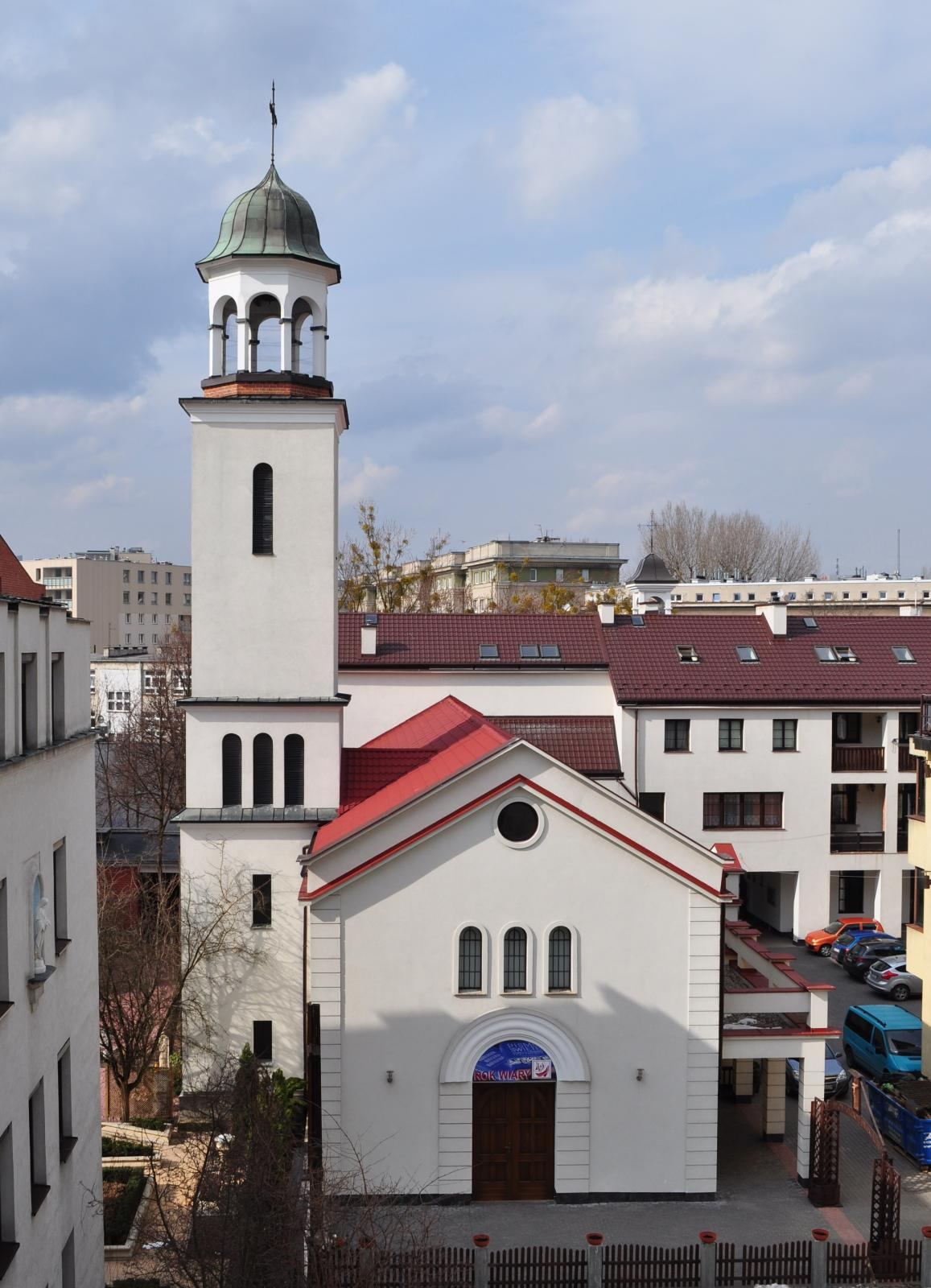 Żytnia 1, 01-014 Warszawa